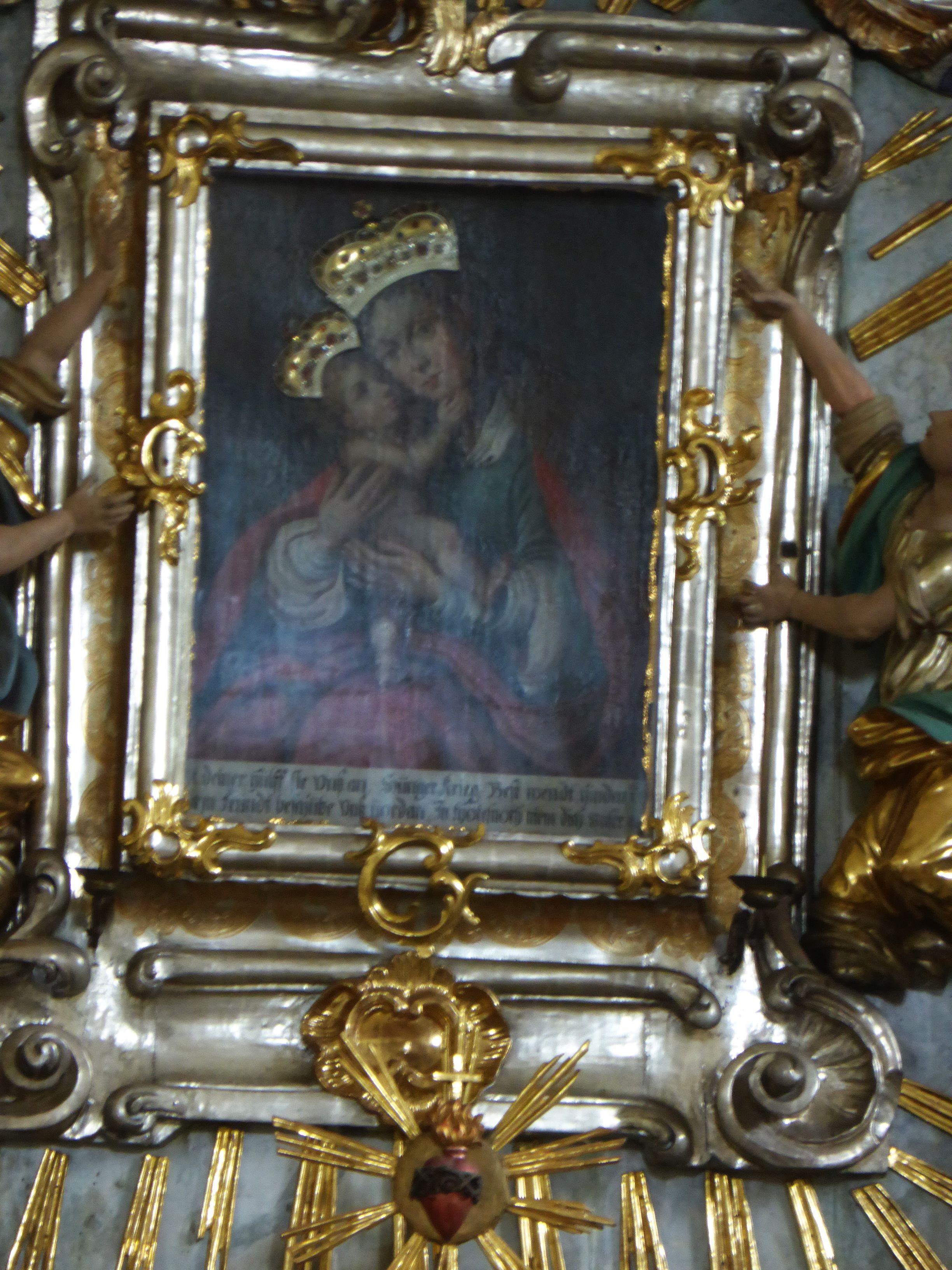 Katholische Maria-Hilf-Bergkirche (Eschenbach in der Oberpfalz)